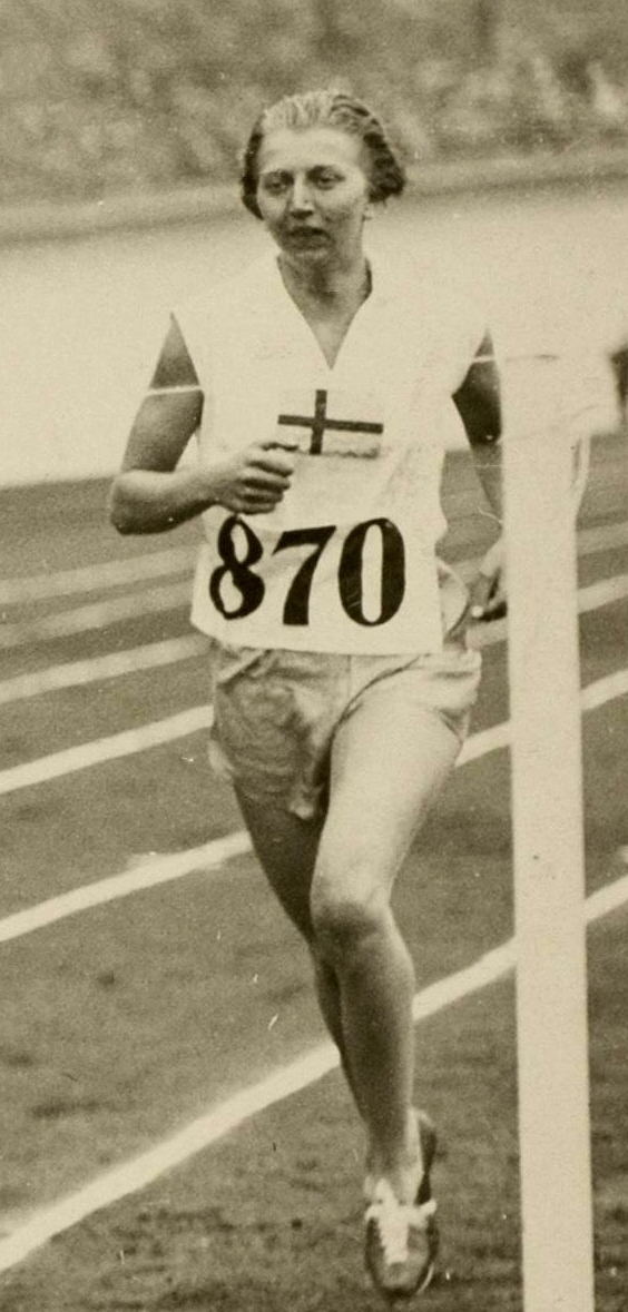 Sport. Sport, Olympische Spelen Amsterdam, 1928, serie van de 800 meter hardlopen (vrouwen).